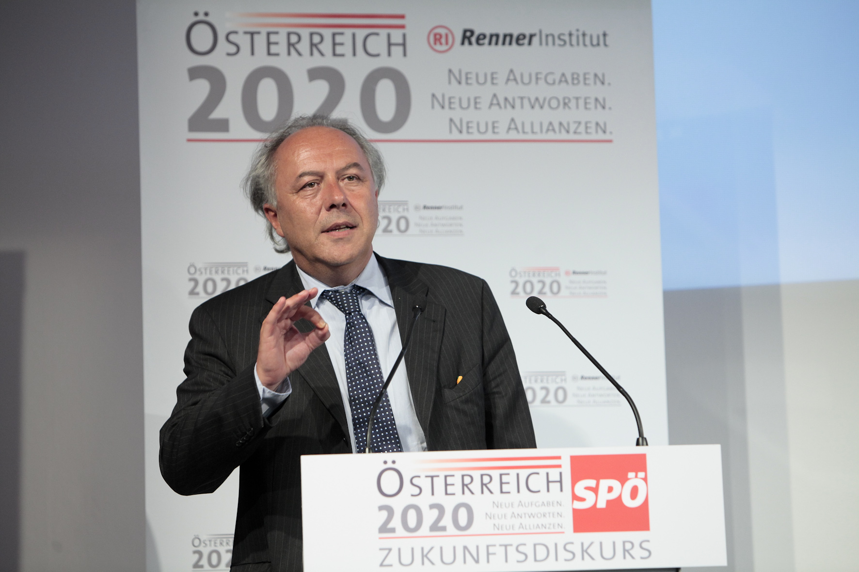 Österreich 2020 Zukunftsdiskurs: "Ökologie als Ökonomie des 21. Jahrhunderts" Museumsquartier/Ovalhalle, Wien 23.05.2011 Foto: Walter Henisch